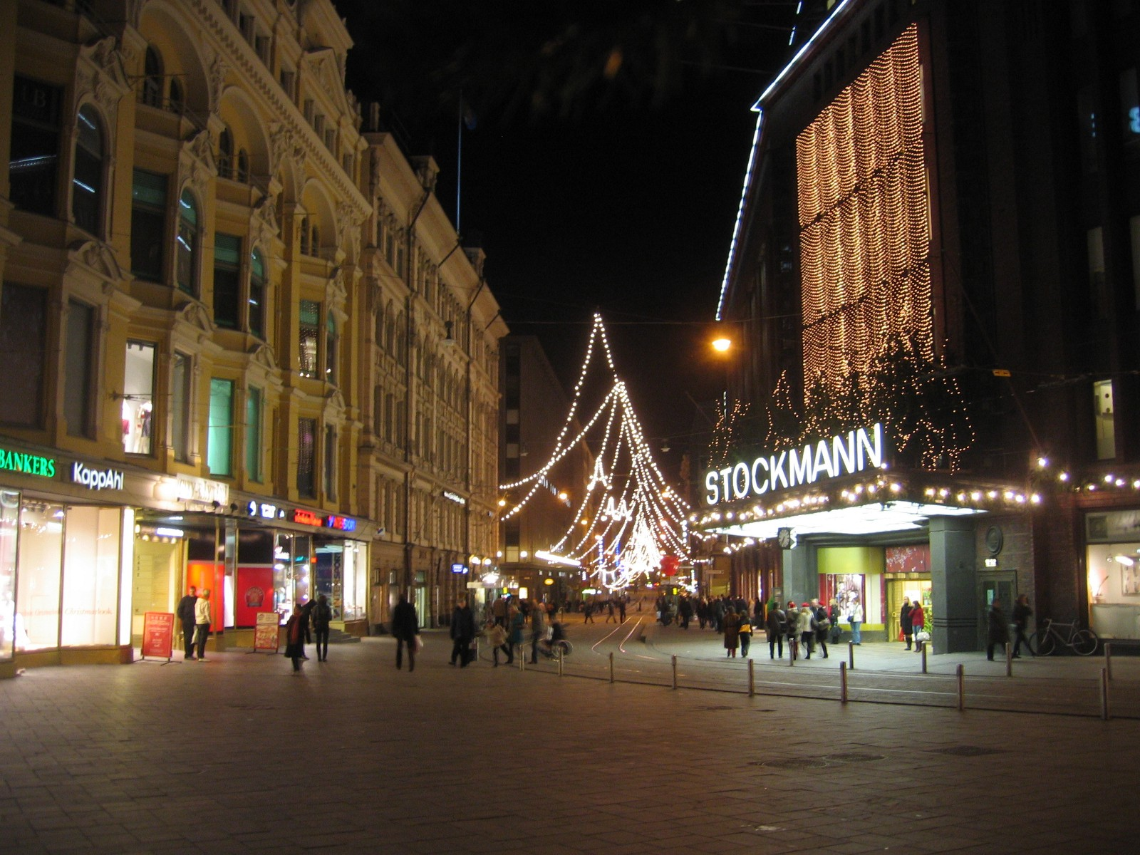 Aleksanterinkatu/Alexandersgatan street in Helsinki, Finland